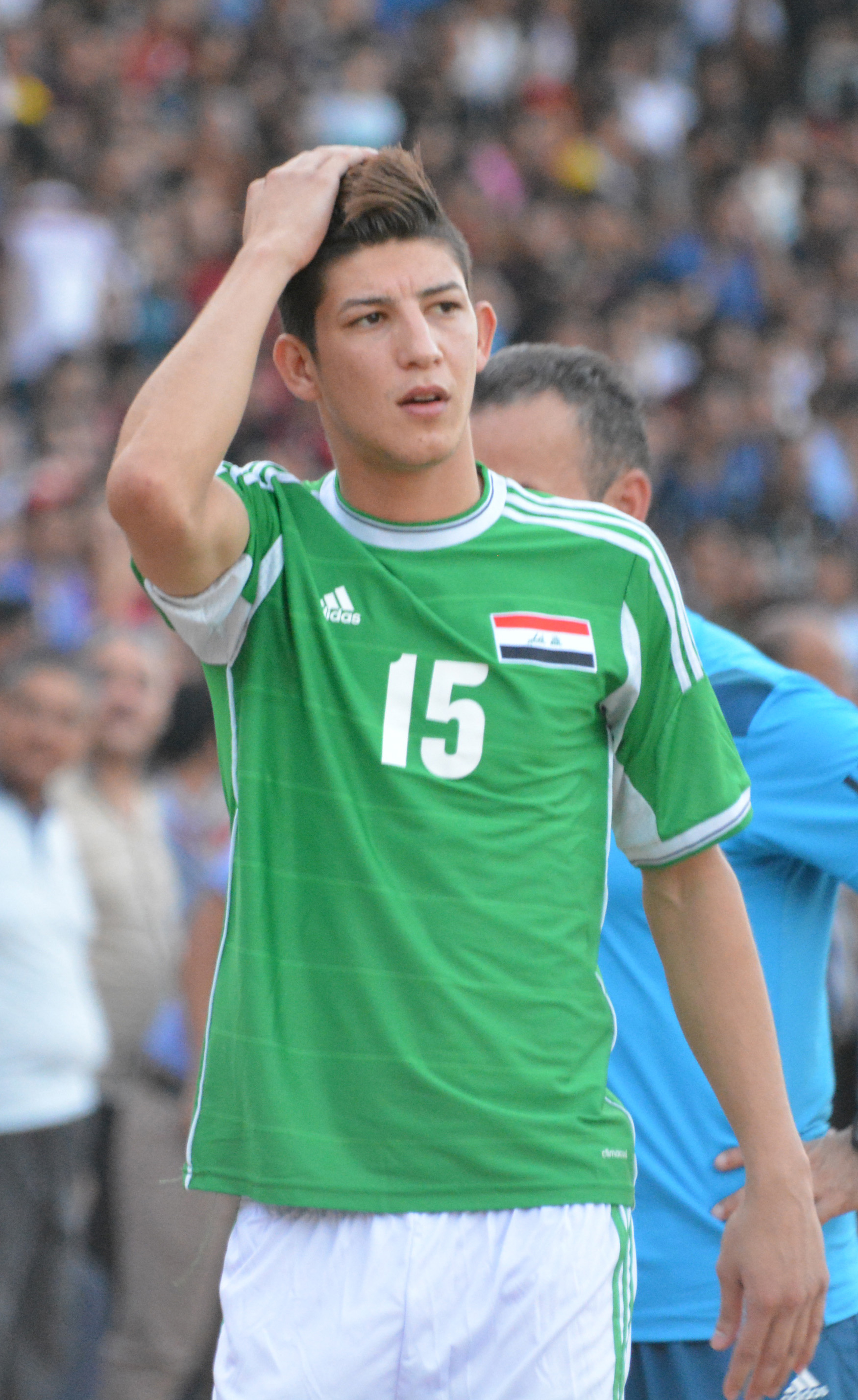 ضرغام اسماعيل